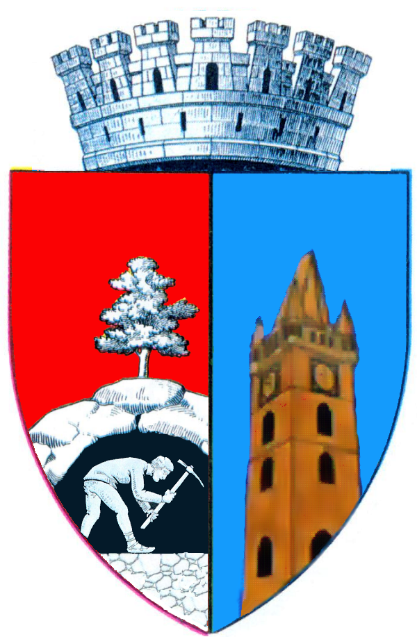 Escudo actual de Baia Mare, Rumanía. Aparece un minero con pico bajo tierra y la torre de San Esteban. Sobre el escudo hay una corona mural.